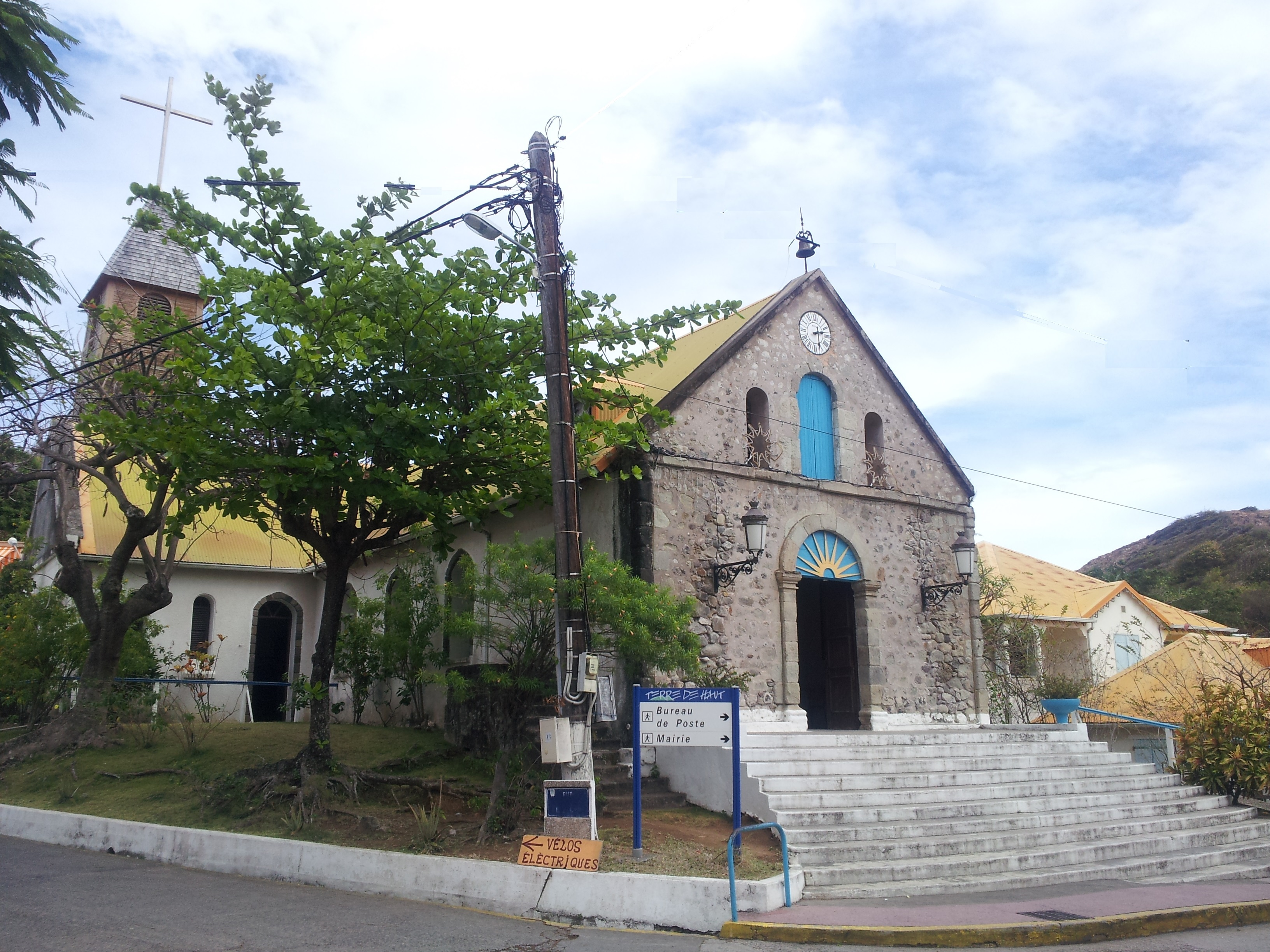 Église Notre-Dame de l'Assomption de Terre-de-Haut